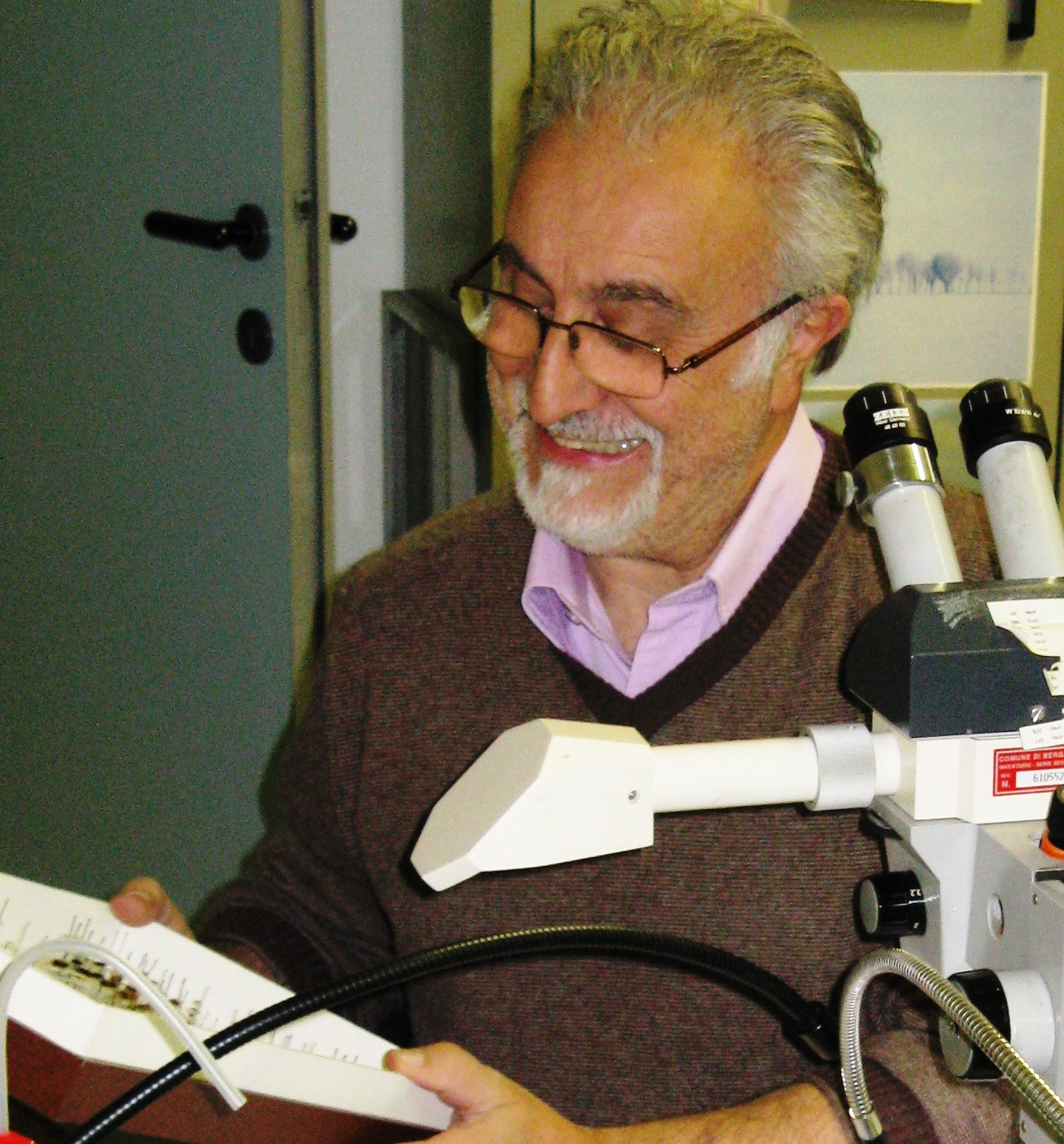 Paride Dioli, entomologo